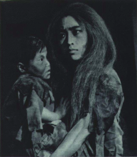 戏剧《白毛女》中白毛女和小白毛，1950年8月的《人民画报》。